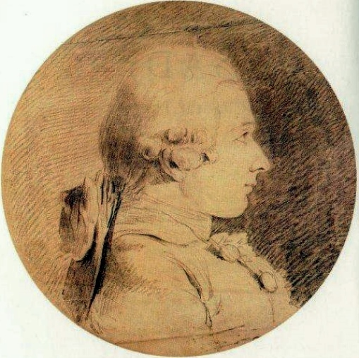 Portrait du Marquis de Sade